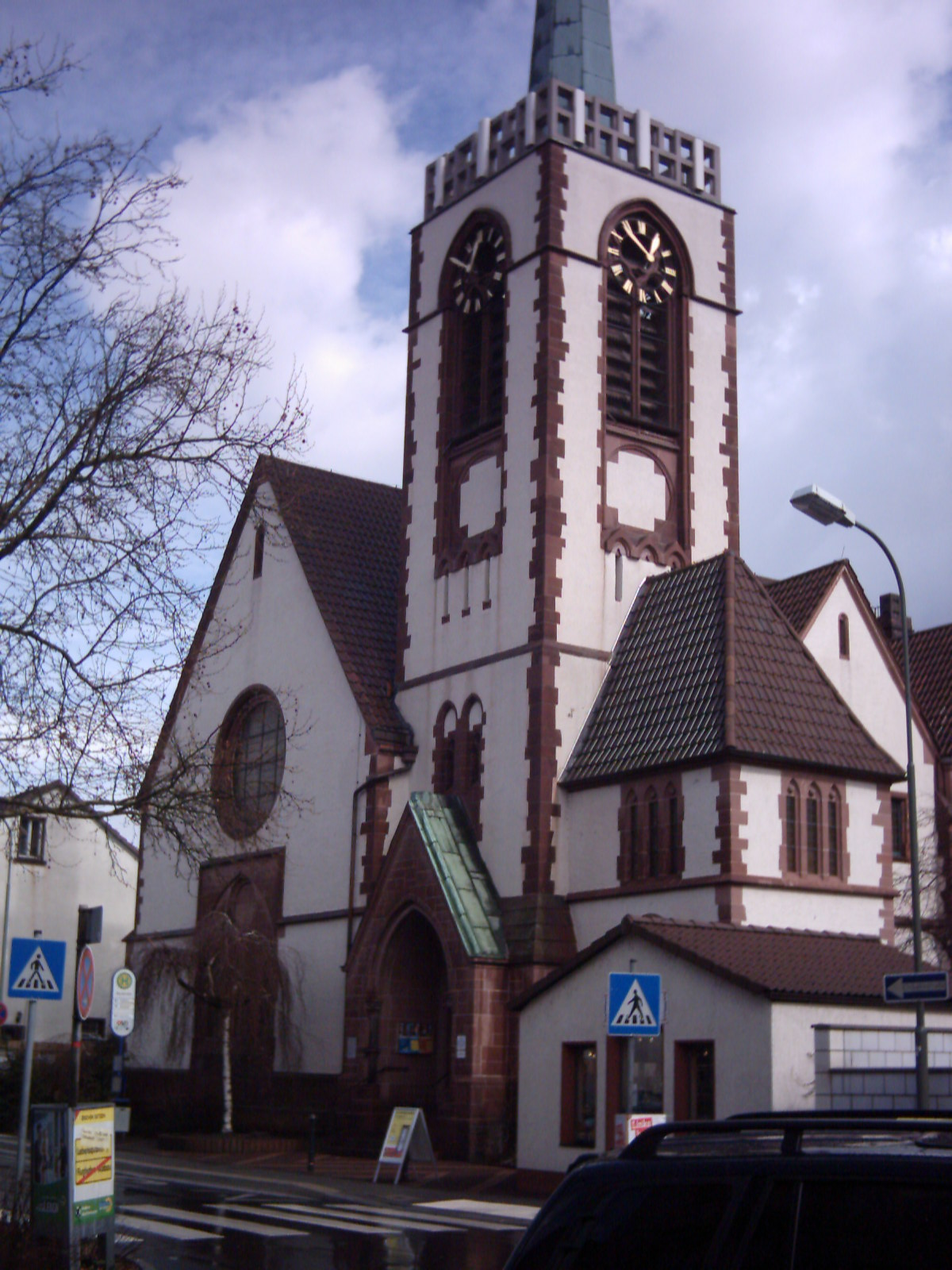 Gustav-Adolf-Kirche in Bürgel, erbaut 1884